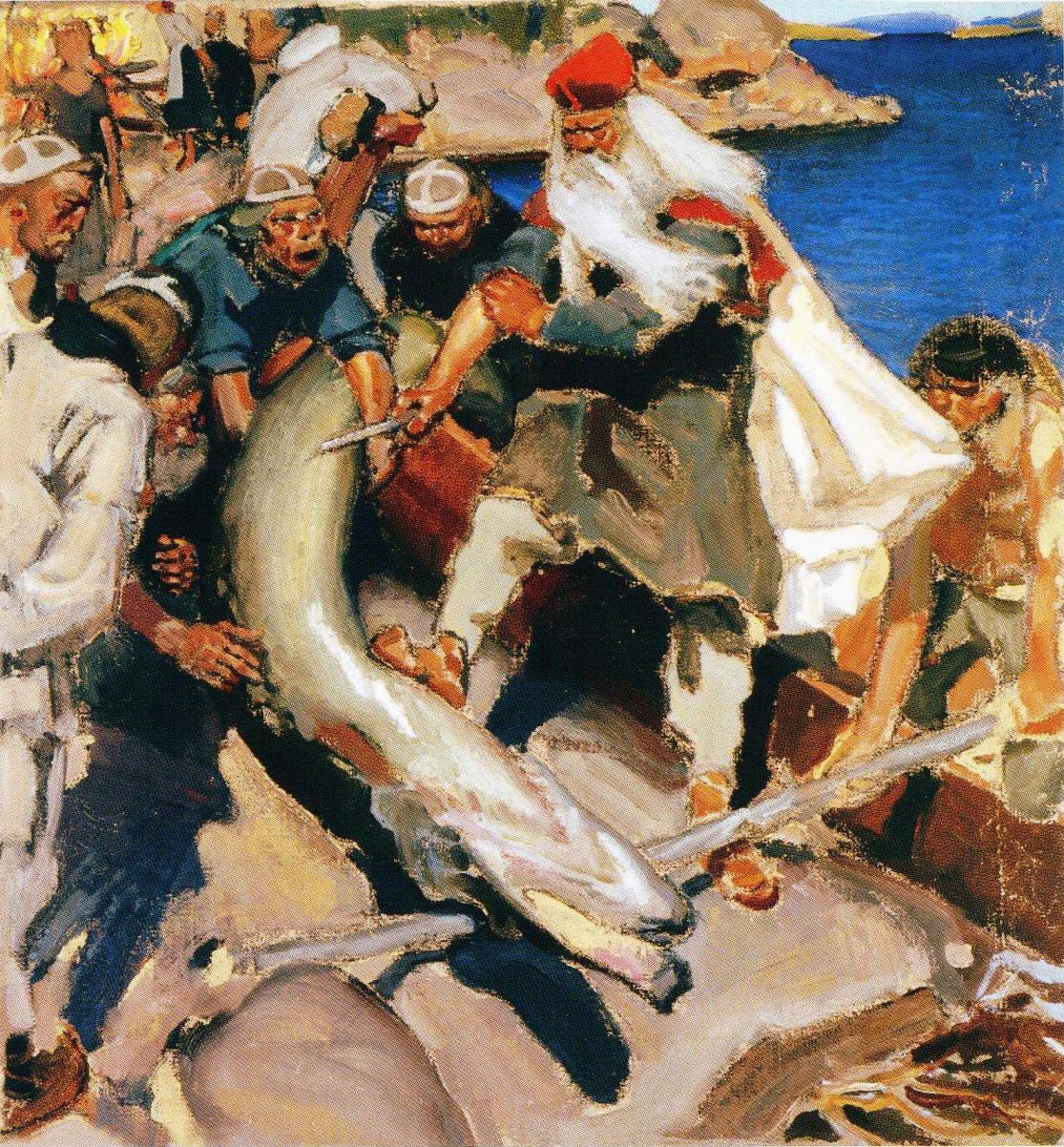 Väinämöinen valmistautuu perkaamaan ison hauen Kalevala-aiheisessa maalauksessa. Gallen-Kallela käytti maiseman mallina parin kilometrin päässä Kalelan ateljeestaan sijainnutta rantakalliota, "ison hauen kalliota".